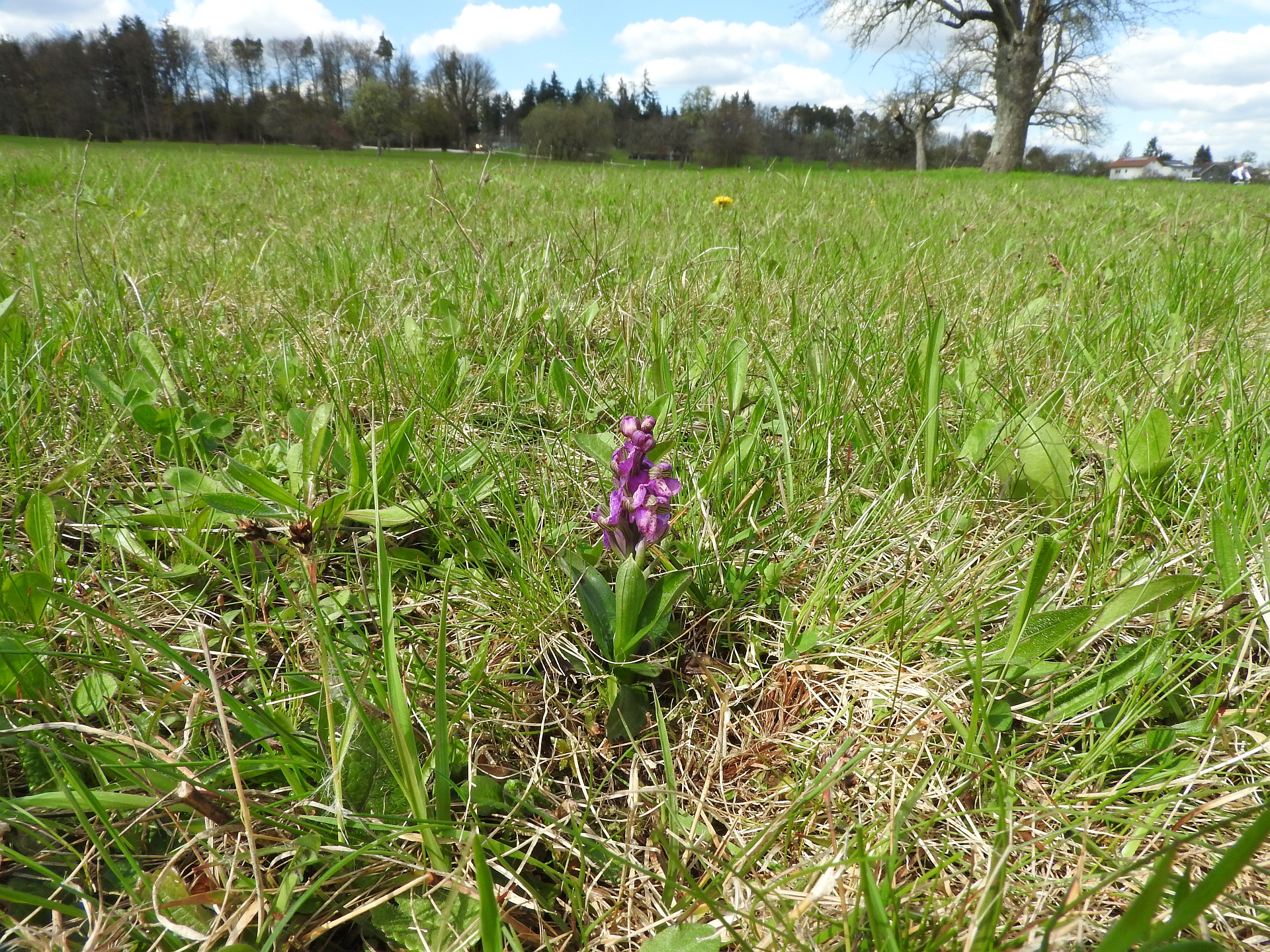 Kleines Knabenkraut (Anacamptis morio), Mistwiesen, Ittersbach, 08.04.2016